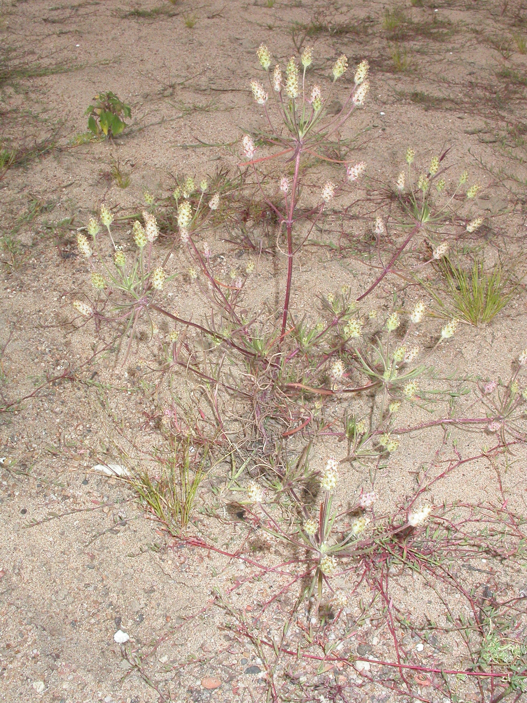 Plantago arenaria Cunault '(Maine-et-Loire), France